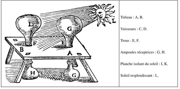 Distillation par la chaleur du soleil, Della Porta, Distillation, 1609